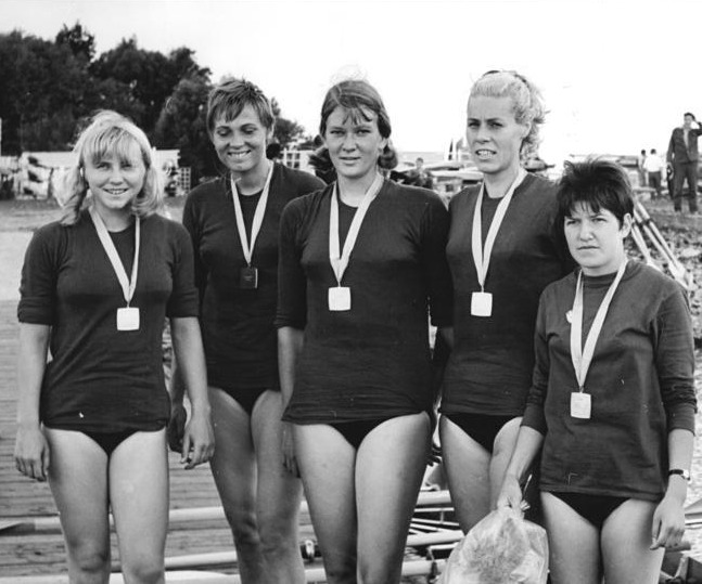 Ruderinnen , DDR, Doppelvierer Zentralbild Wendorf-22.7.69 Brandenburg: 1. Verbandstreffen des Deutschen Rudersportverbandes der DDR am 20.7.69- Den Meistertitel im Doppelvierer der Frauen errangen (vlnr) Monika Ringel, Inge Schneider, Ingelore Kremtz, Dagmar Seibt und Steuerfrau Bauschke